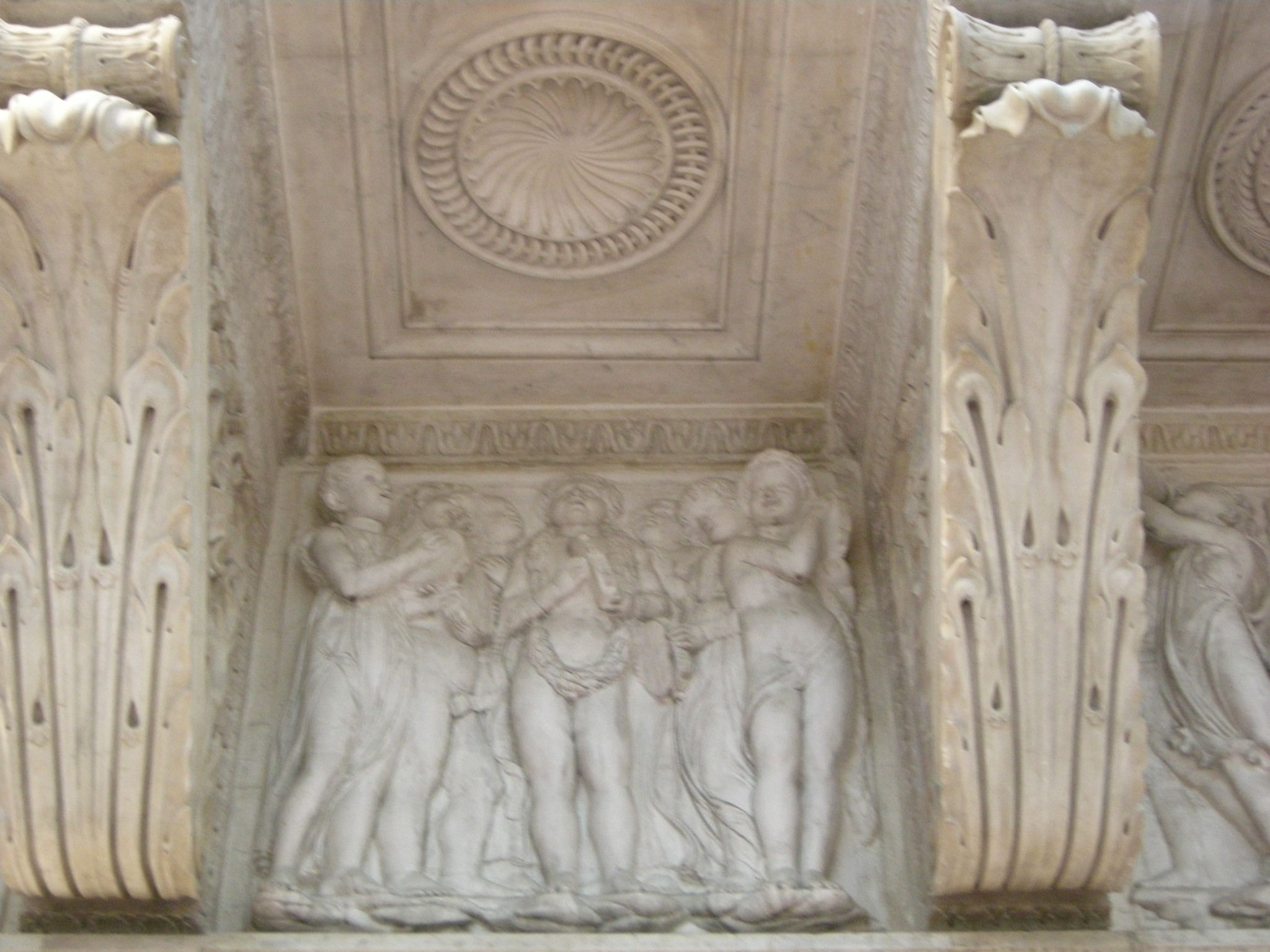 Cantoria di luca della robbia